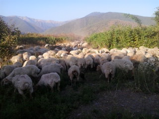 İlisuda qoyunçuluq